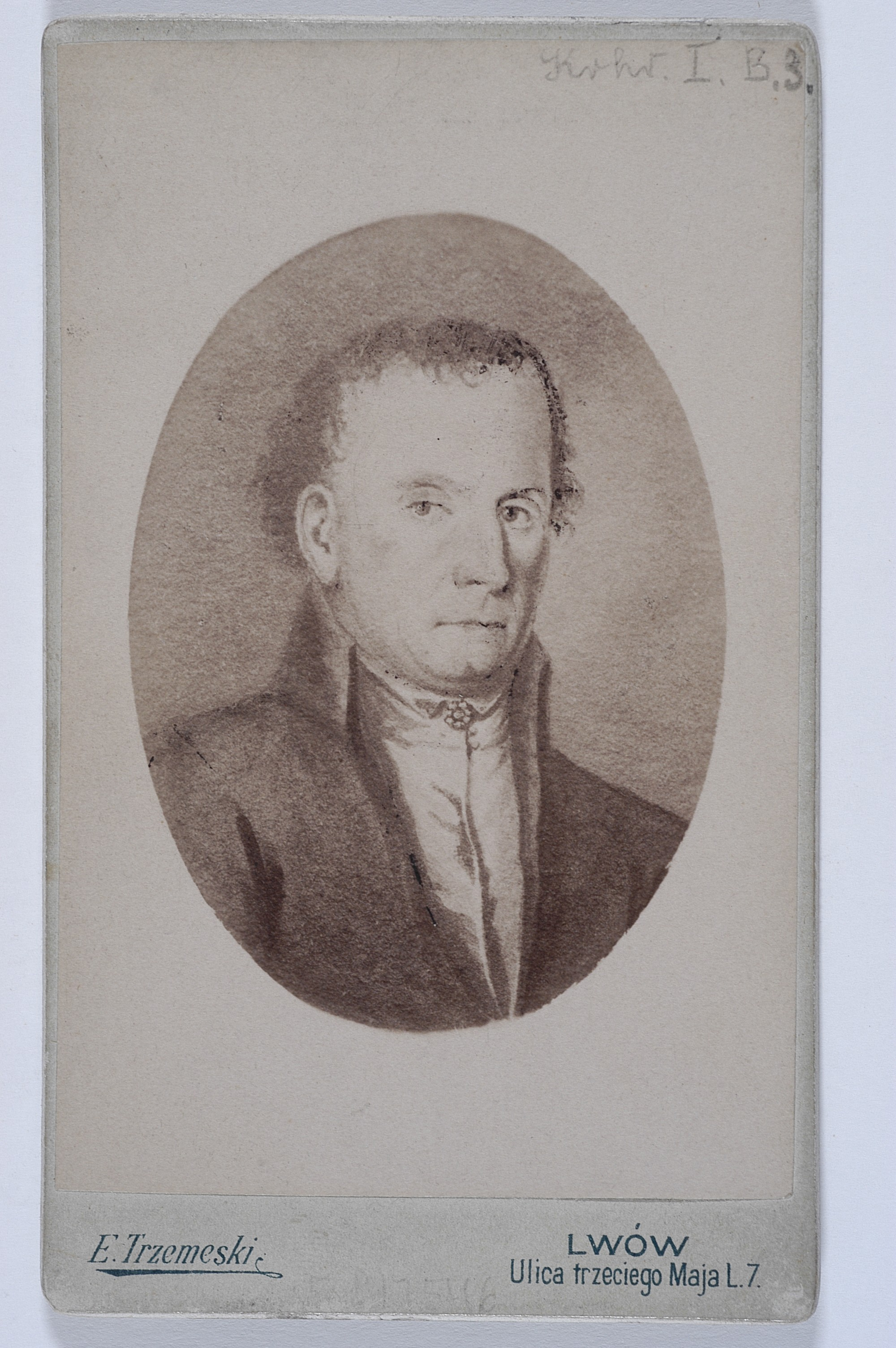 Marcin Badeni, fot. malarskiego portretu, ok. 1885 r.